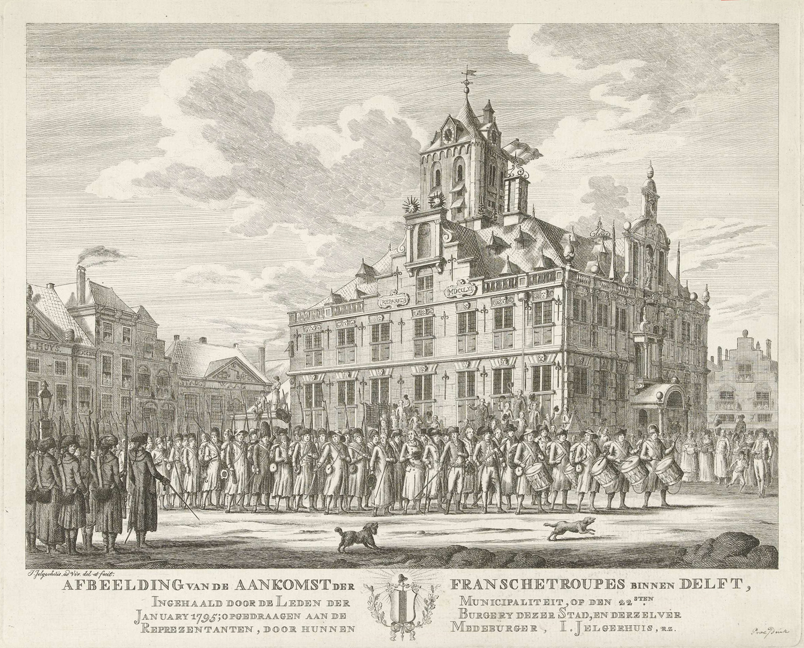 Durant l'hiver 1794-1795, la nouvelle république française mène une série d'attaques dans les Provinces-Unies. Cette gravure, datée de 1795-1797, montre les troupes françaises se présentant aux représentants de Delft devant la mairie, sur la place Groote Markt.